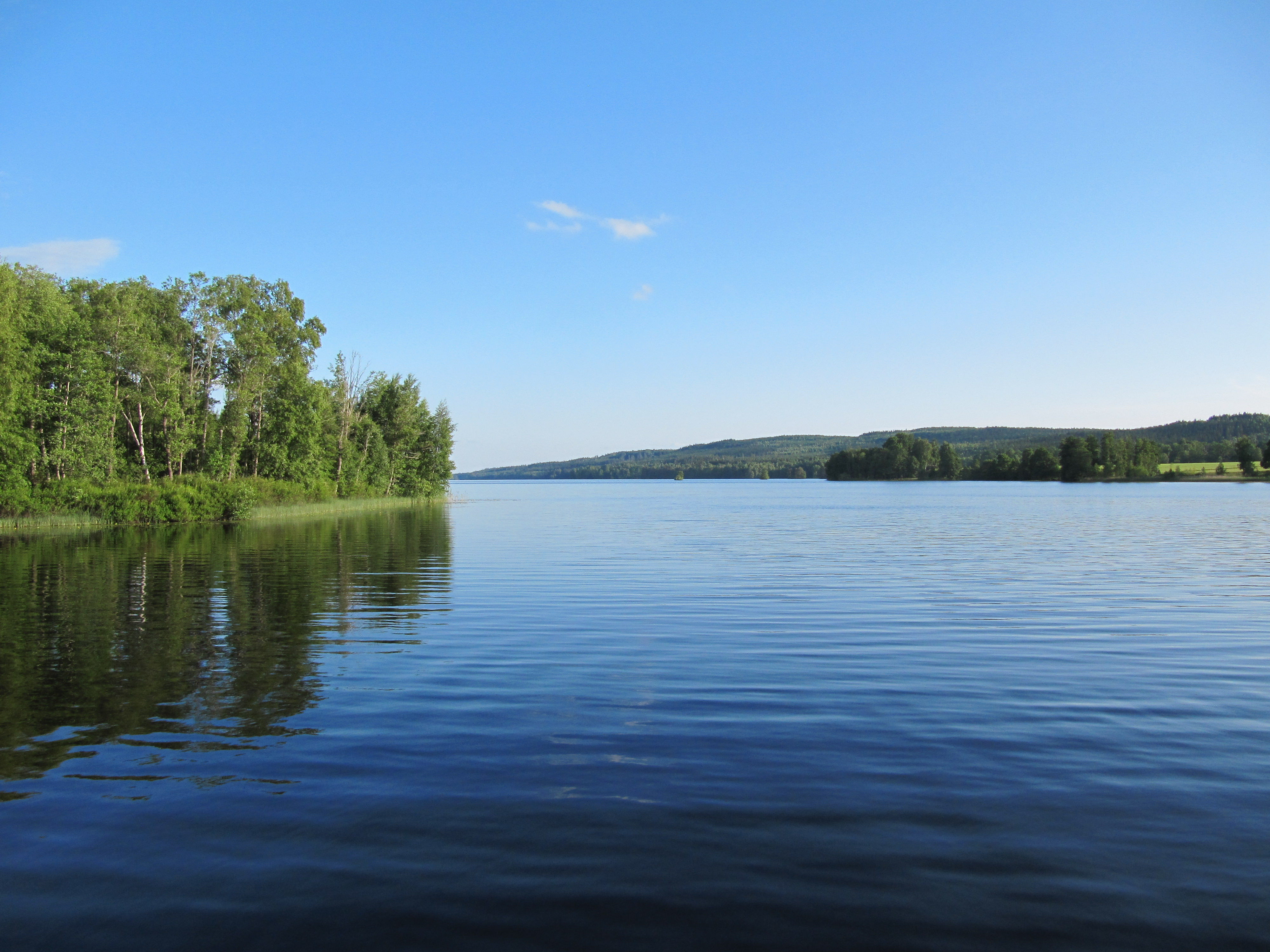 Asasjöns norra del